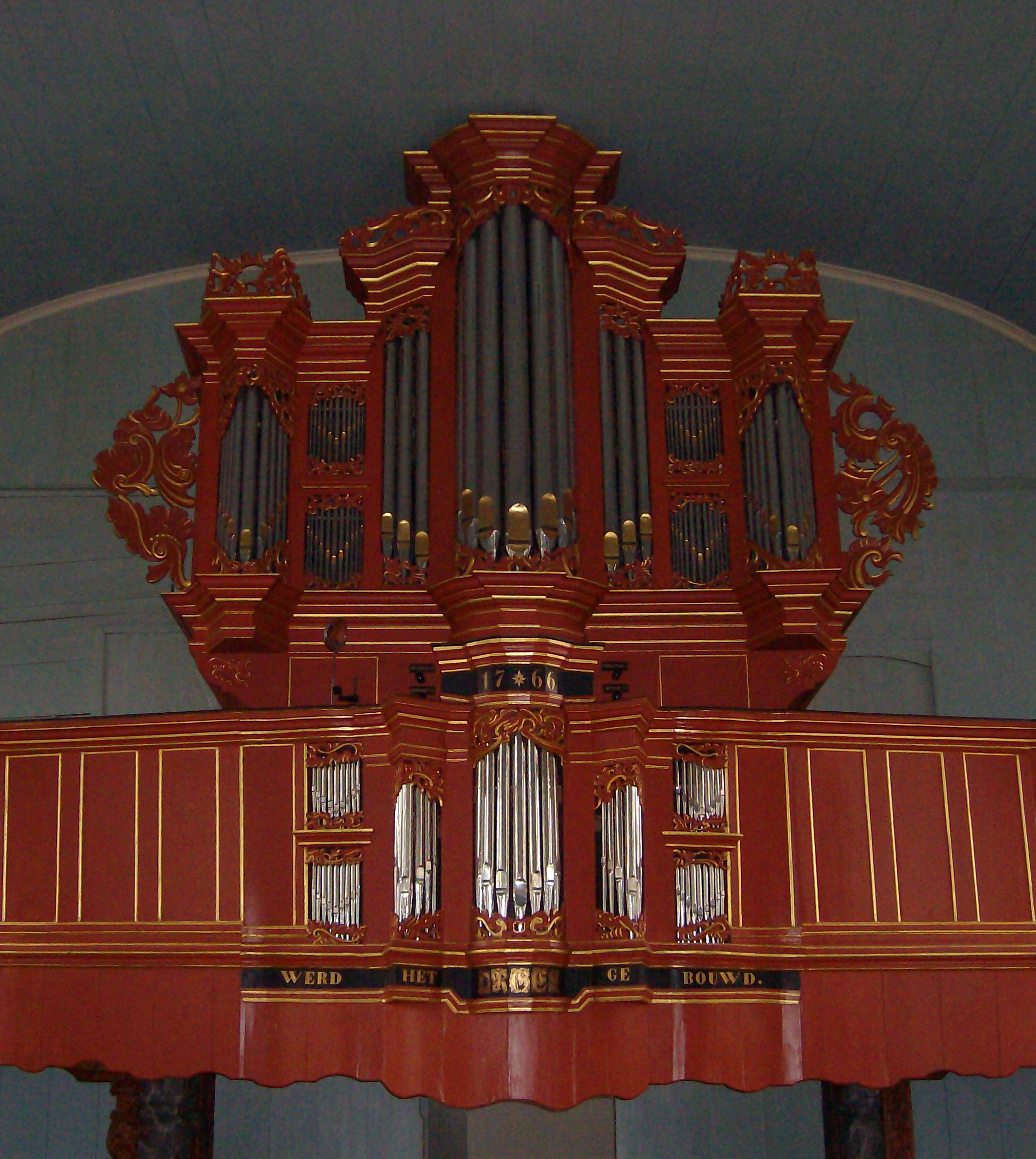 Orgel Midlum